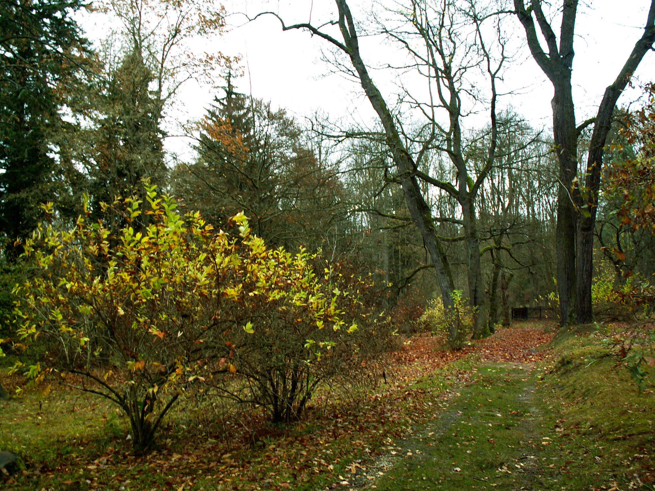 a. zahrada